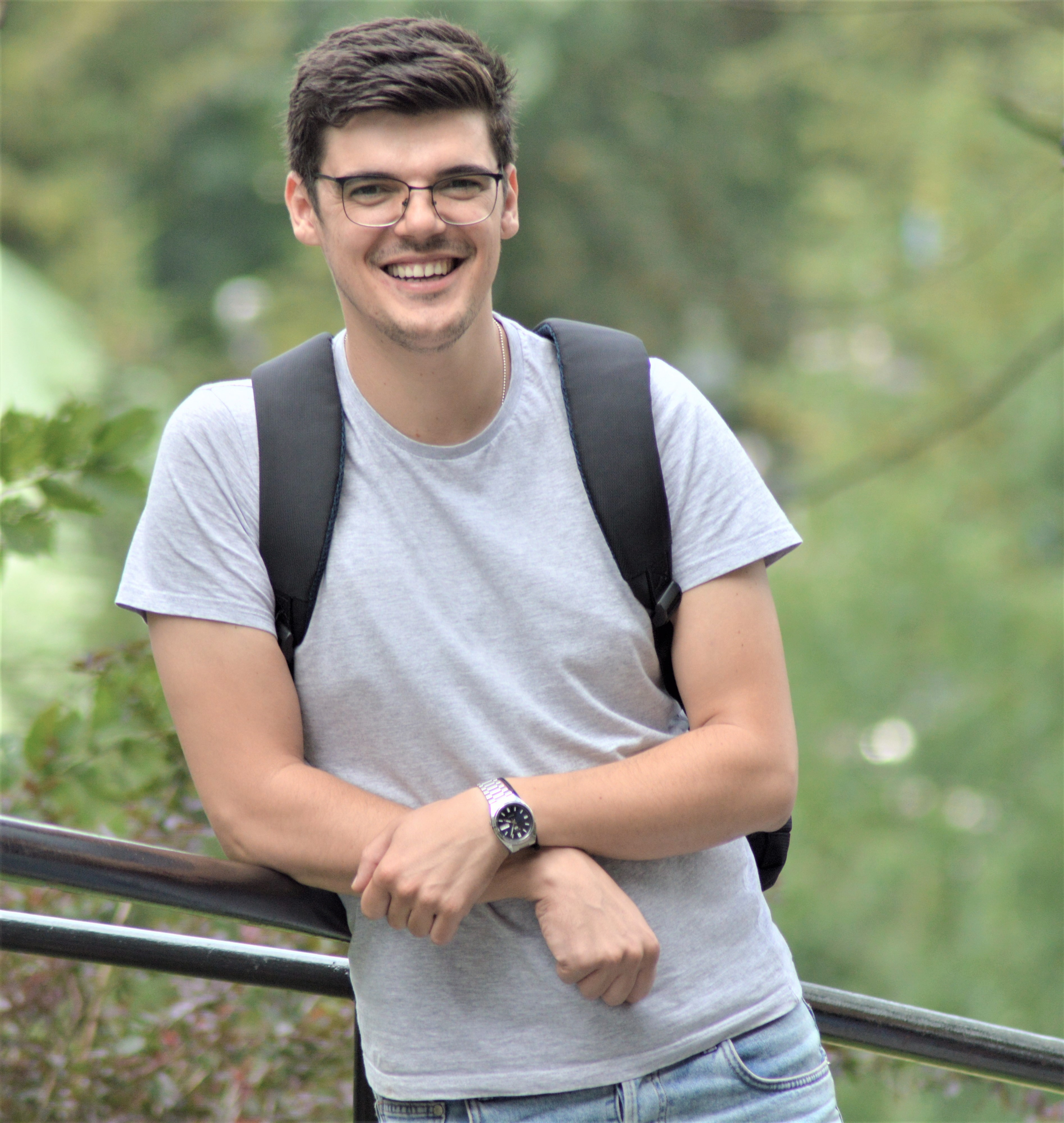 A képen Fazakas László látható. A fotó 2018. augusztusában készült a Törcsvári kastélynál.